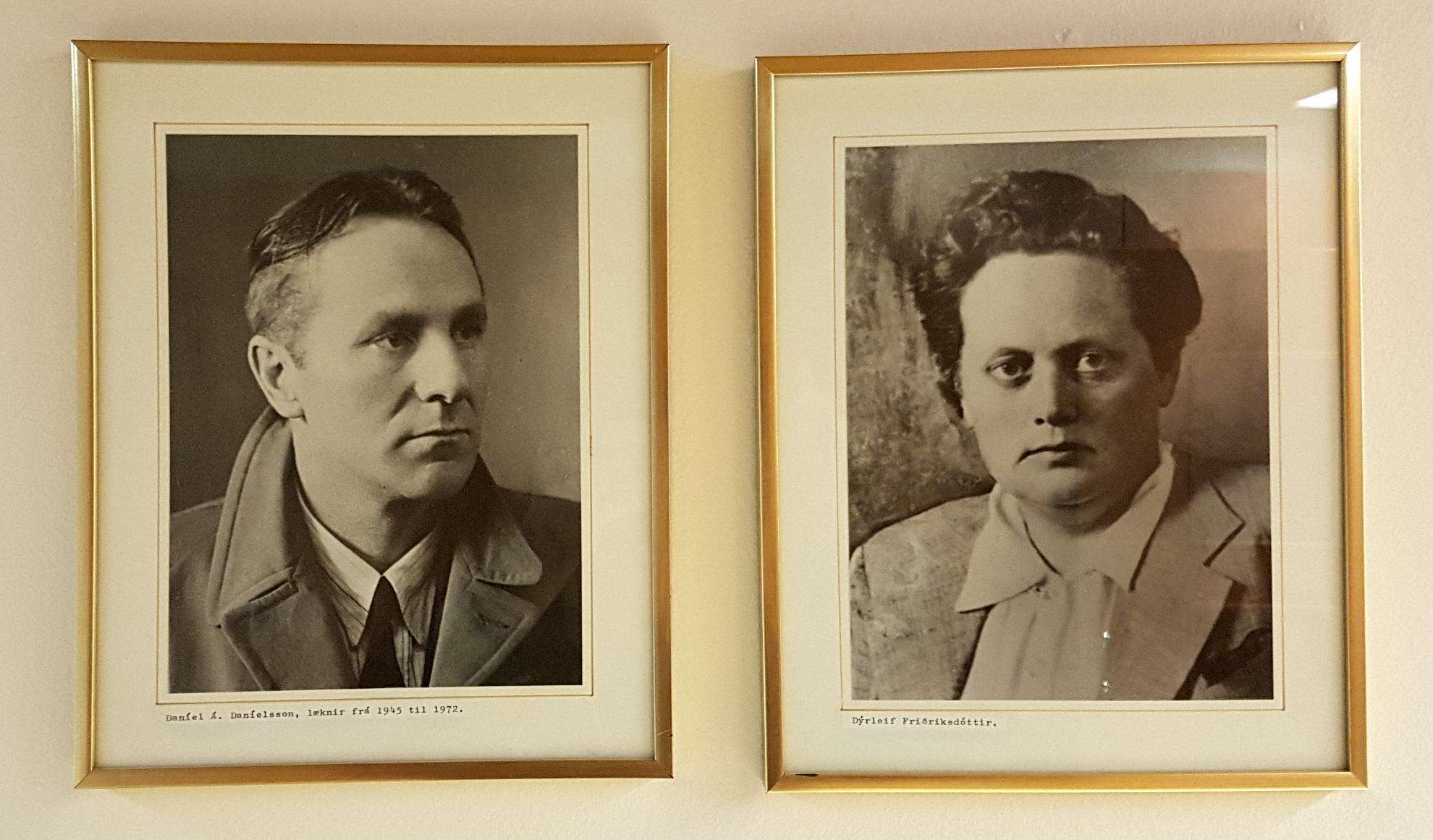 Myndir á vegg Heilsugæslustöðvarinnar á Dalvík.